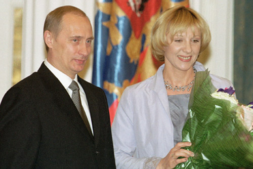 МОСКВА, КРЕМЛЬ, ЕКАТЕРИНИНСКИЙ ЗАЛ. Церемония вручения Государственных премий и премий Президента. С актрисой театра «Современник» Еленой Яковлевой.